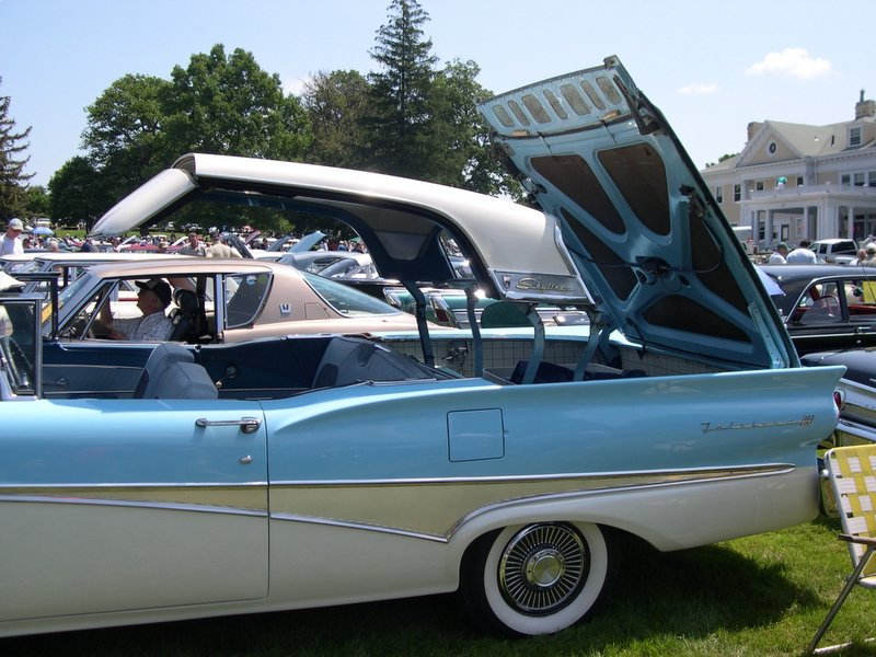 1958 Ford Fairlane 500 Skyliner